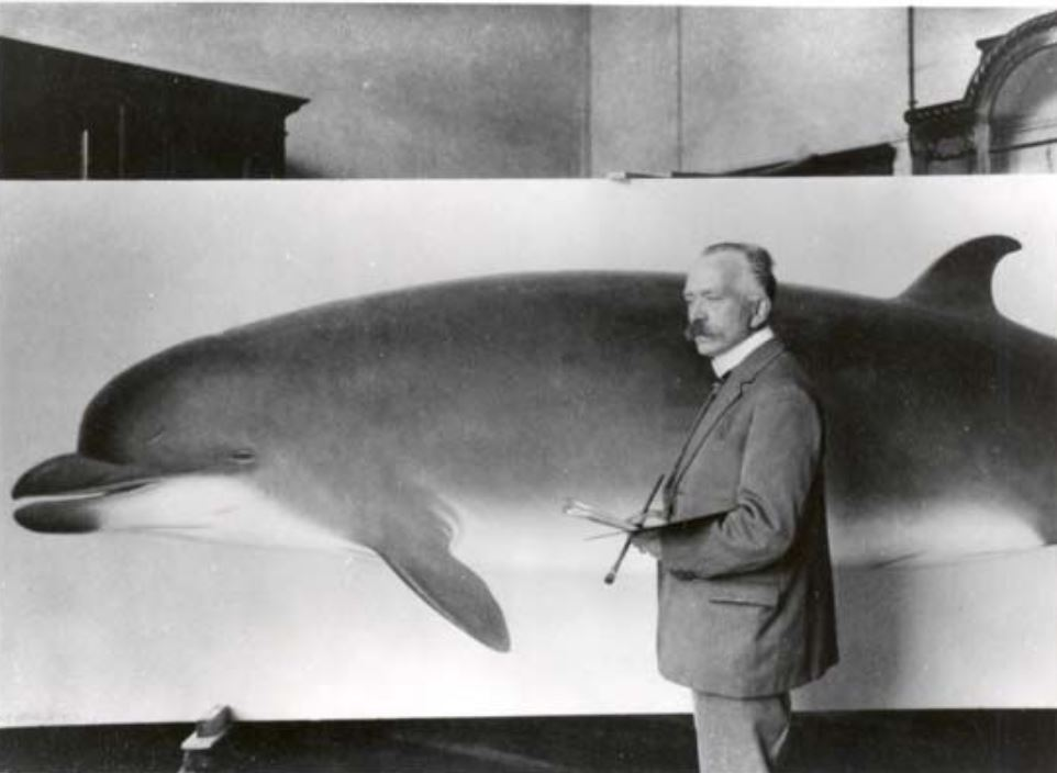 Marinus Adrianus Koekkoek der Jüngere (1873-1944), auch Marinus Adrianus Koekkoek II., wegen Namensgleichheit mit seinem Grossonkel Hermanus Koekkoek der Ältere oder I.